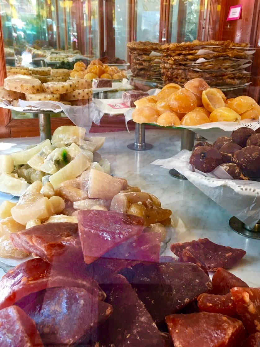 Fruta cristalizada de la Dulcería de Celaya.